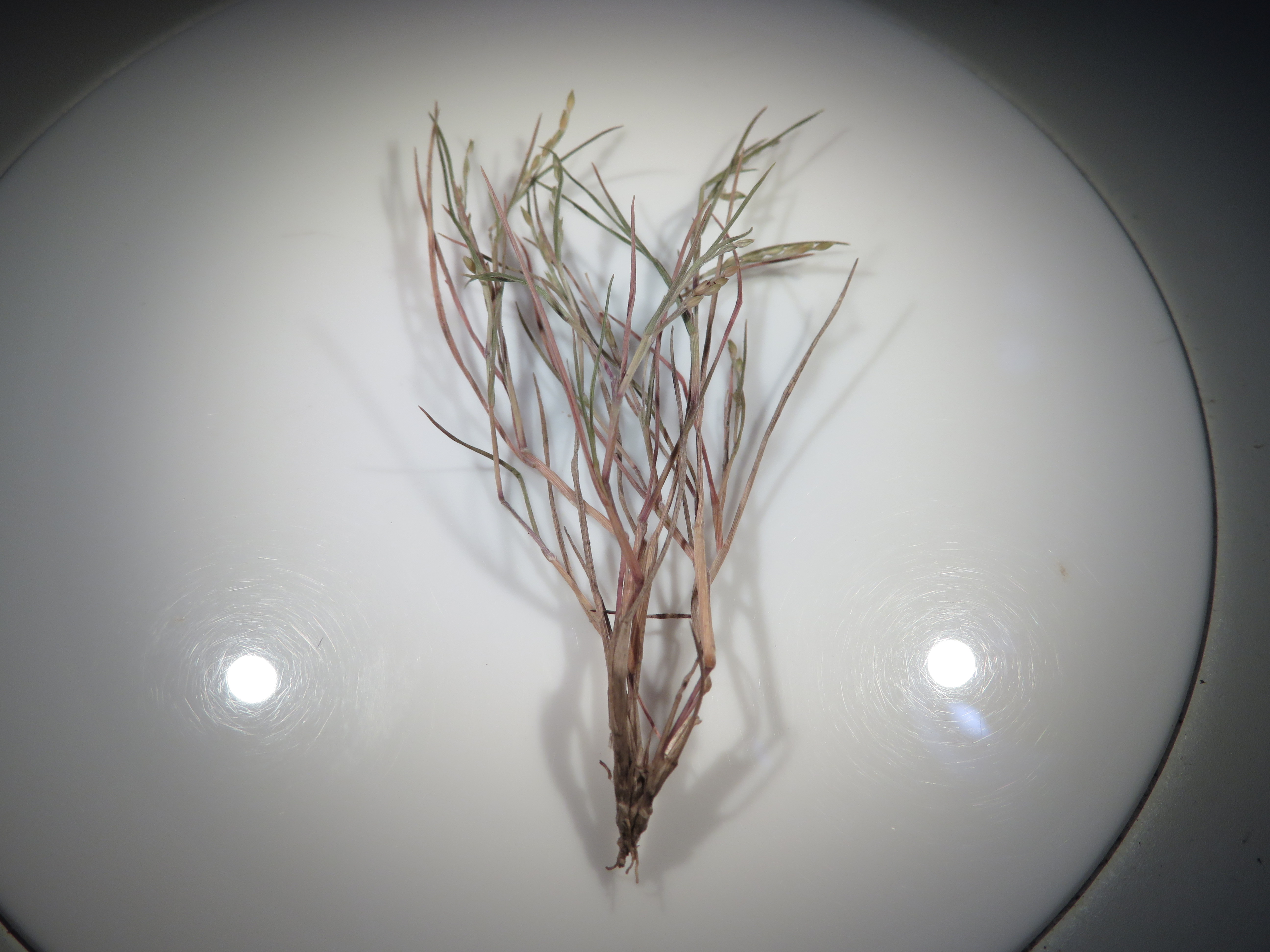 Panicum fauriei var. fauriei (Panicum) Microscope view at Honolua Lipoa Pt, Maui, Hawaii. May 31, 2018 #180531-3853 Image Use Policy